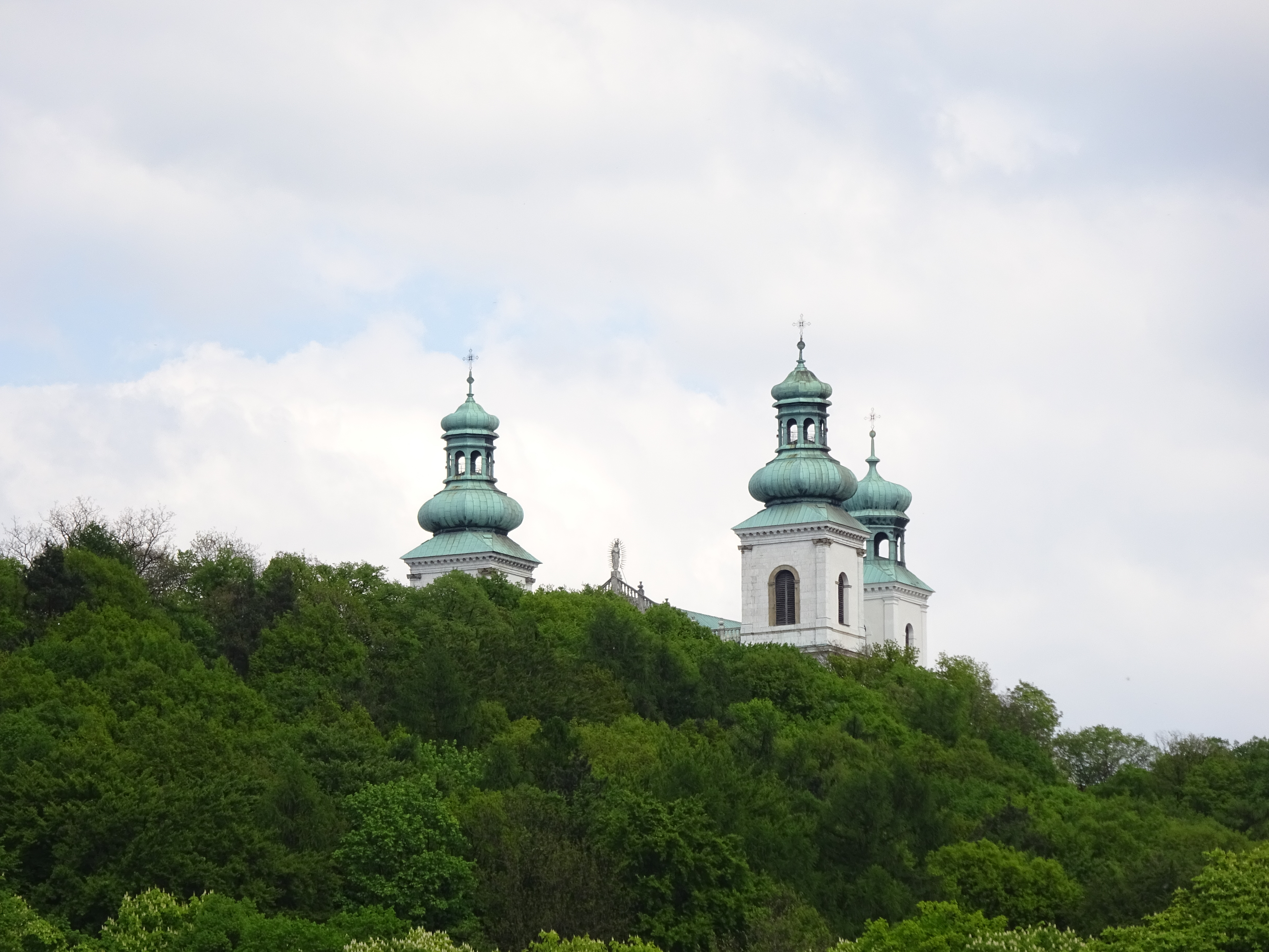 Widok z ul. Księcia Józefa na Klasztor Kamedułów i jego wieże. Kraków, 2016.